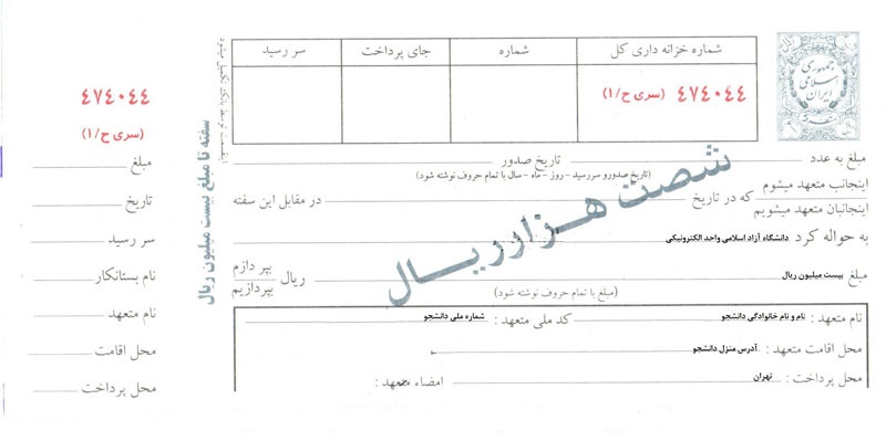 سفته